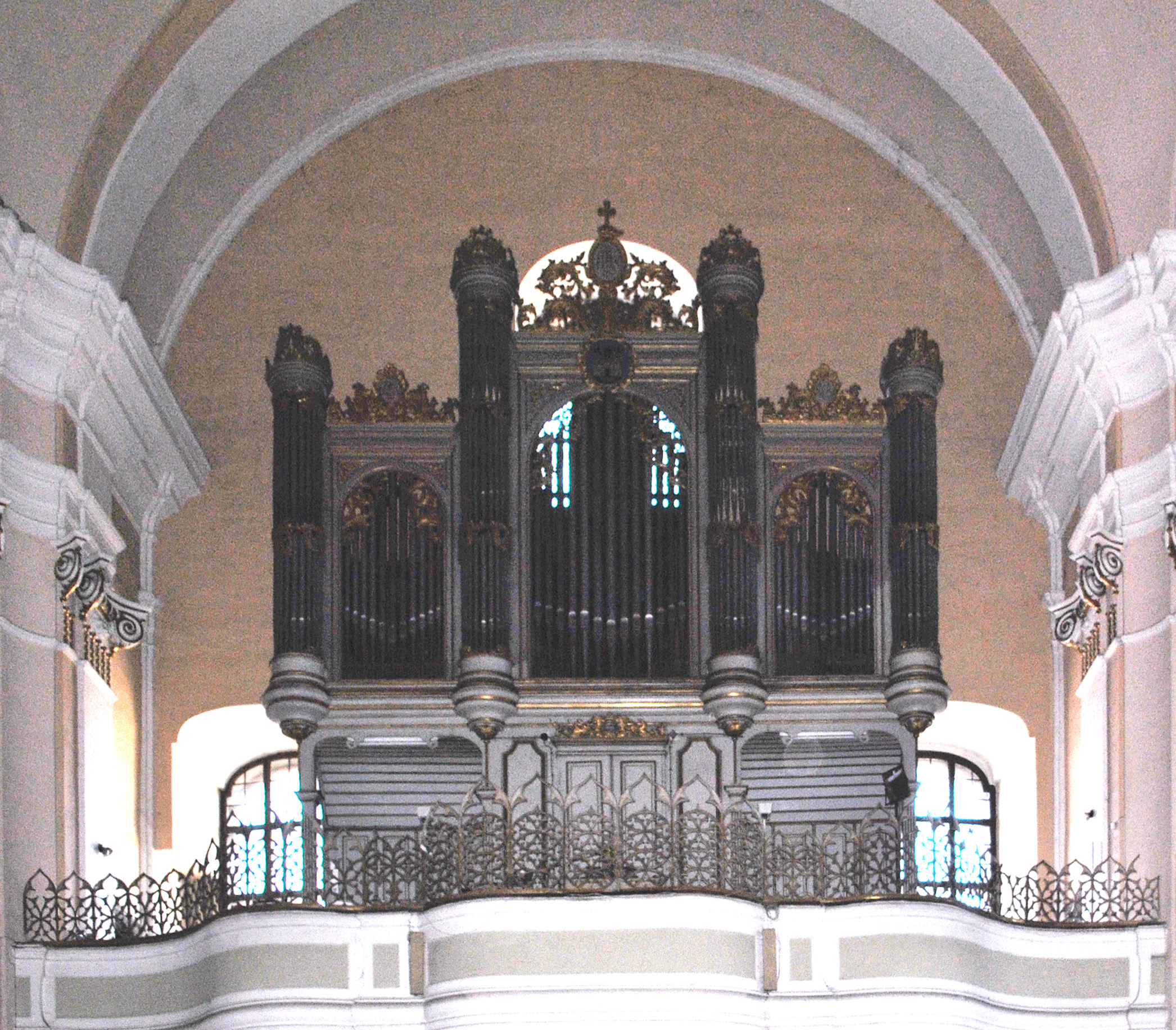 Komorn, Andreaskirche, Orgel von Carl Friedrich Ferdinand Buckow (1801–1864}, erbaut 1864